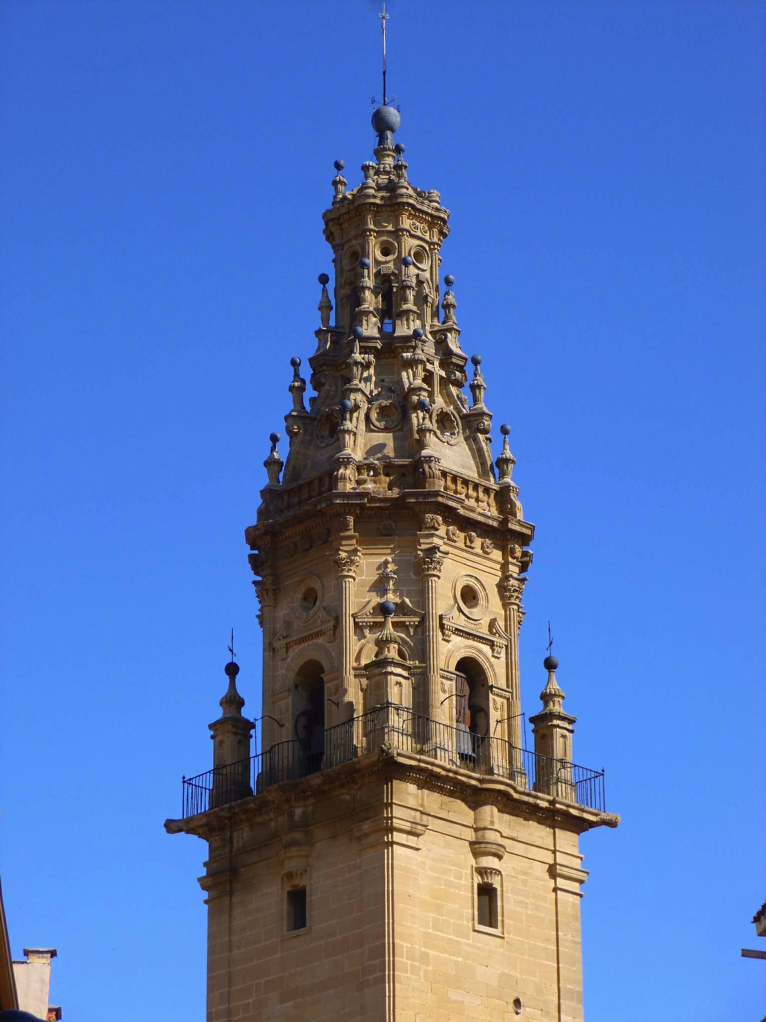 Iglesia de Santa María de la Asunción (Oyón, Álava)